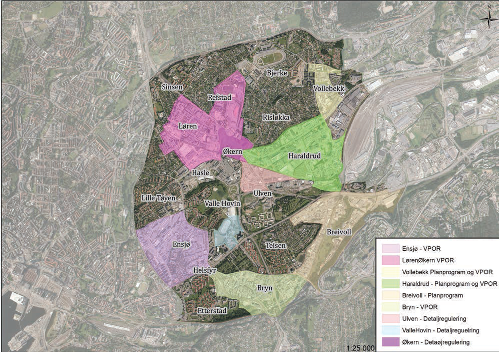 Kart over de ulike strøkene og reguleringsplans-områdene i Hovinbyen.